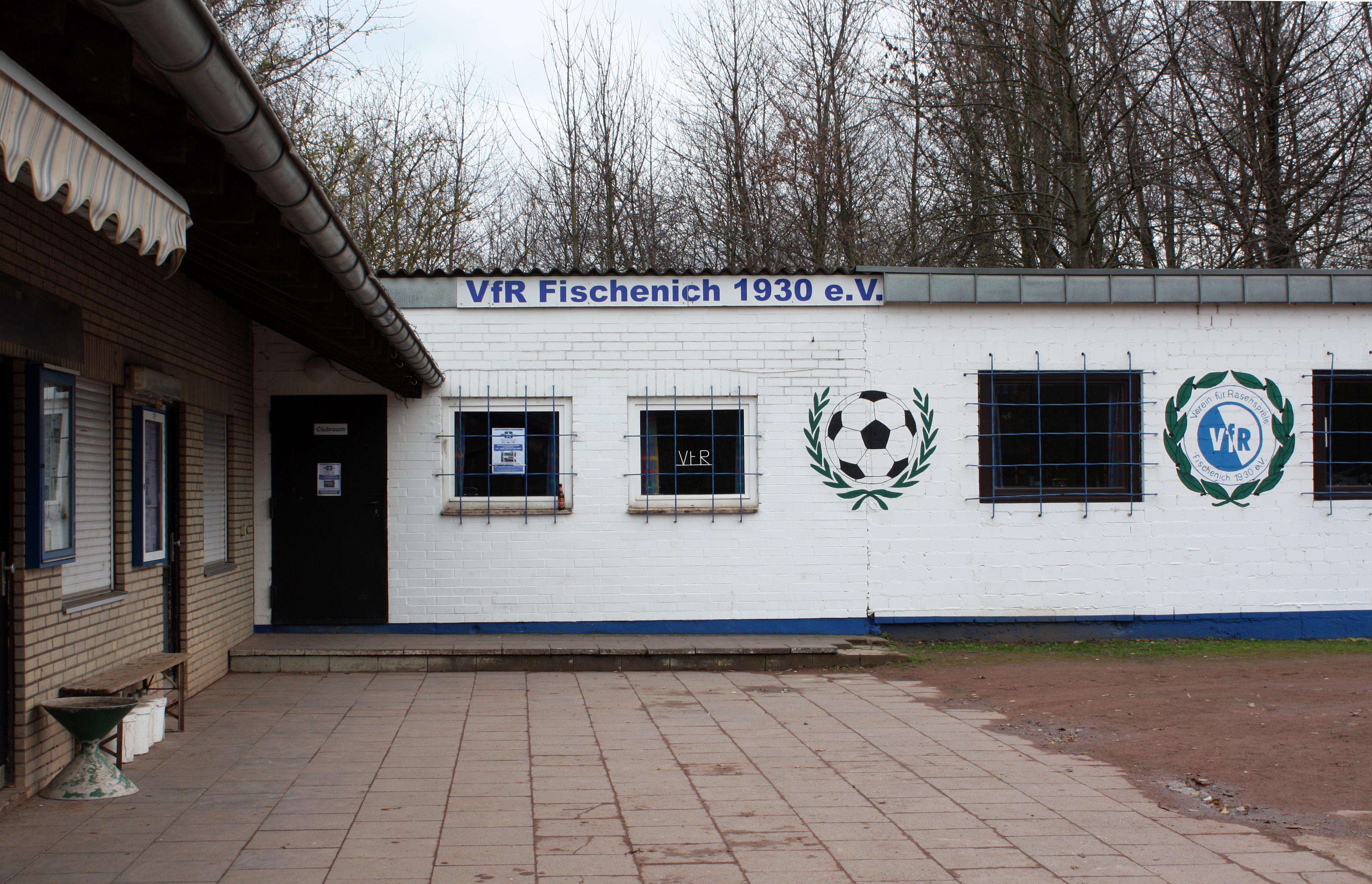 Hürth-Fischenich, VfR-Fischenich Vereinshaus